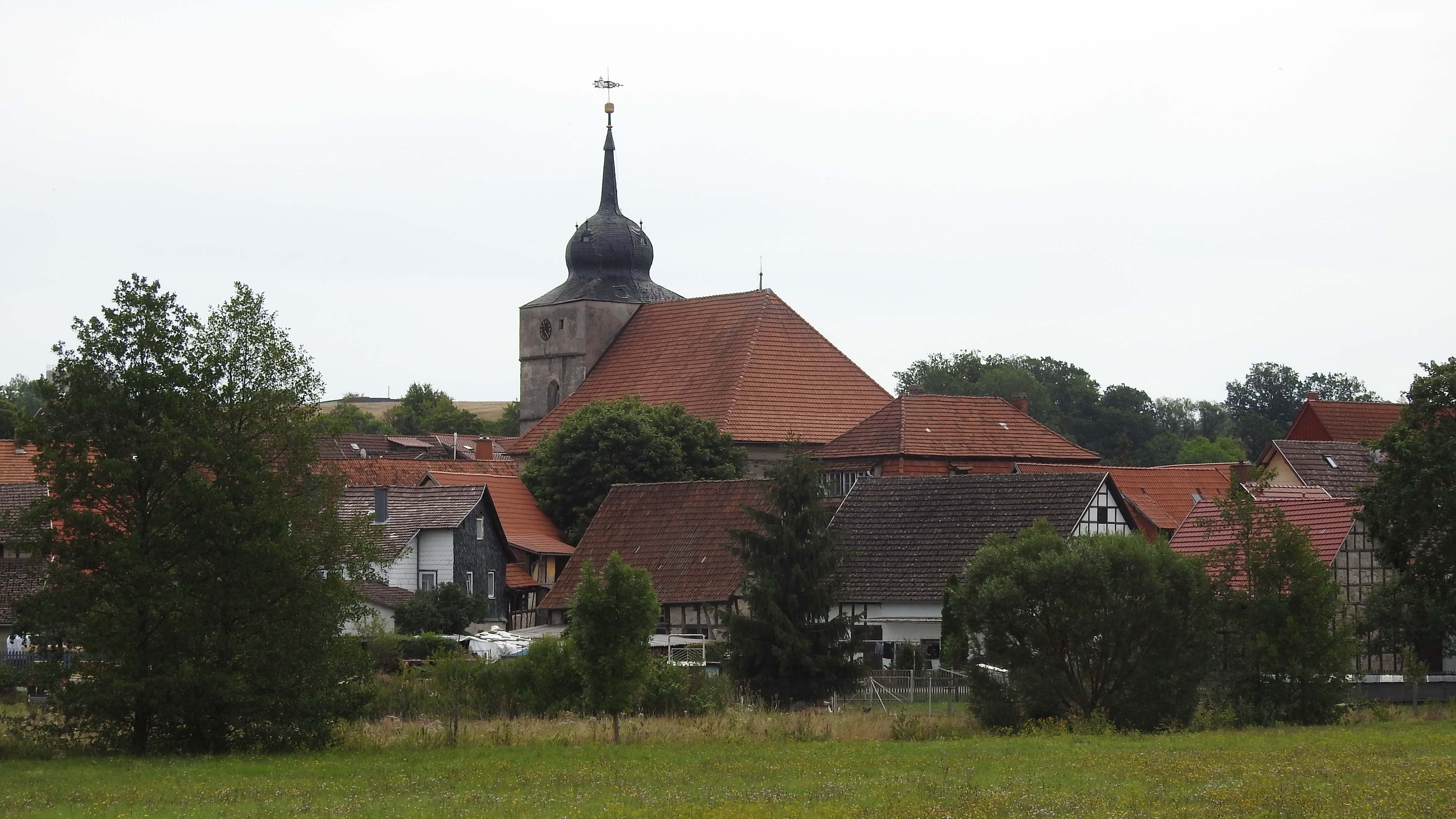 Ummerstadt von Westen